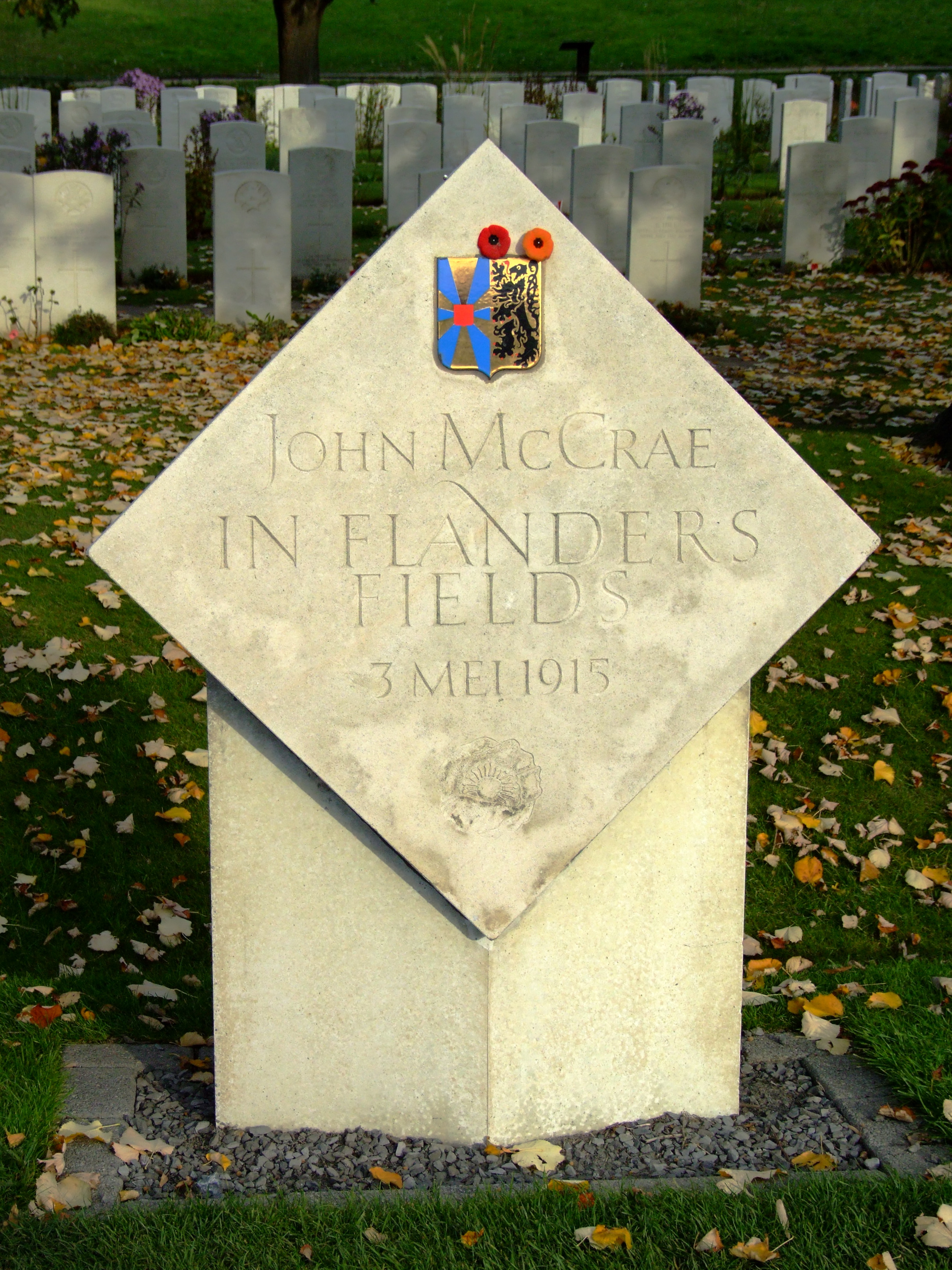 Gedenkstein auf dem Essex Farm Military Cemetery bei Ypern in Belgien, zur Erinnerung an John McCrae und sein Gedicht In Flanders Fields vom 3. Mai 1915.